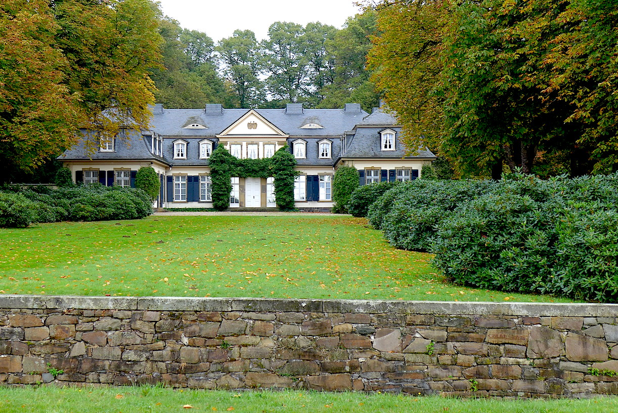 "Тропа Клинка" - туристский маркированнный маршрут вокруг немецкого города Золинген (Северный Рейн-Вестфалия). Седьмой этап: окрестностями Лангенфельда. 8.4 км.